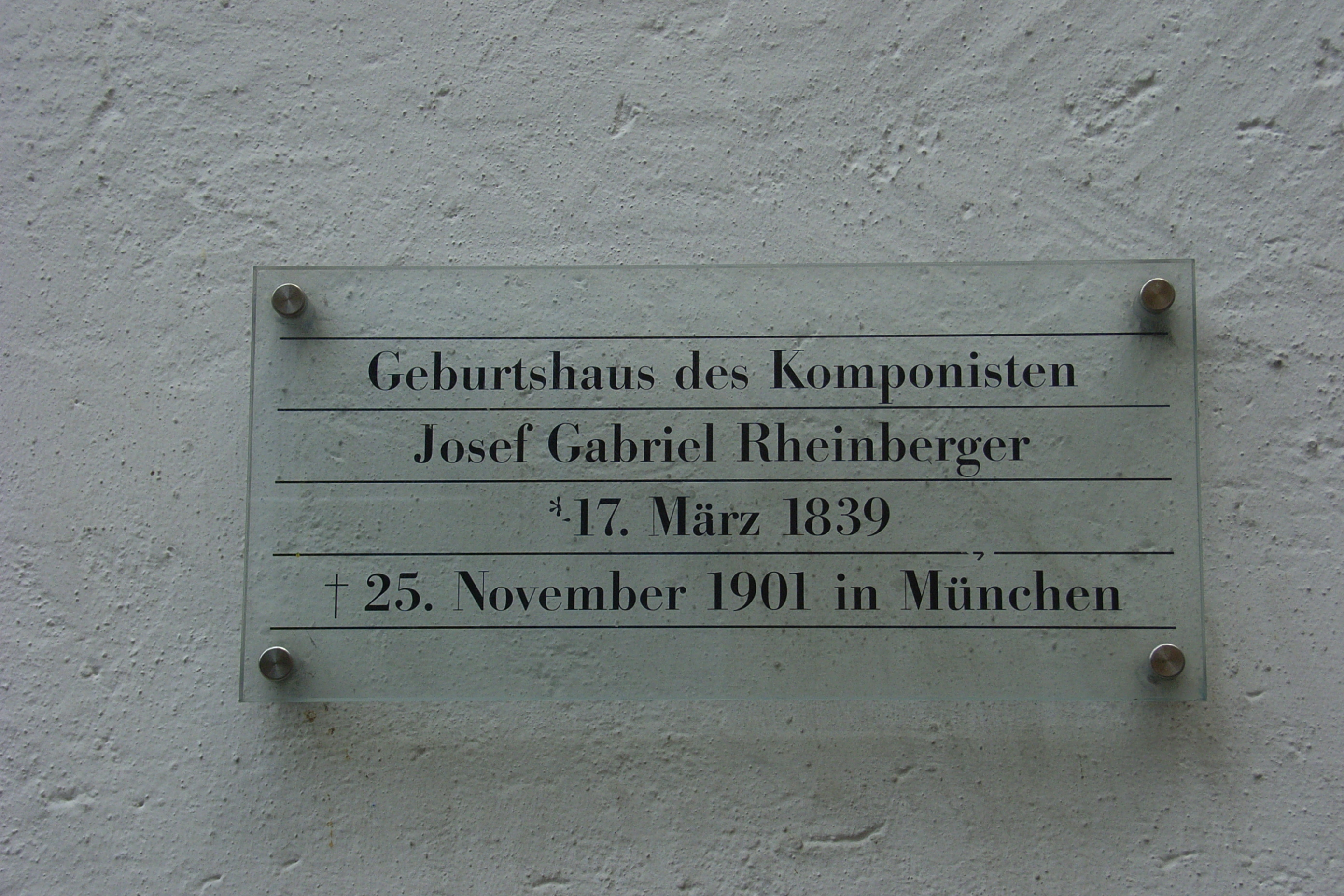 Liechtenstein Tafel am Geburtshaus von Joseph Rheinberger